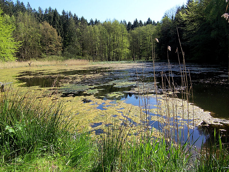 Hütter Wohld bei Bad Doberan, Fischteich mit ökolögischer Bewirtschaftung